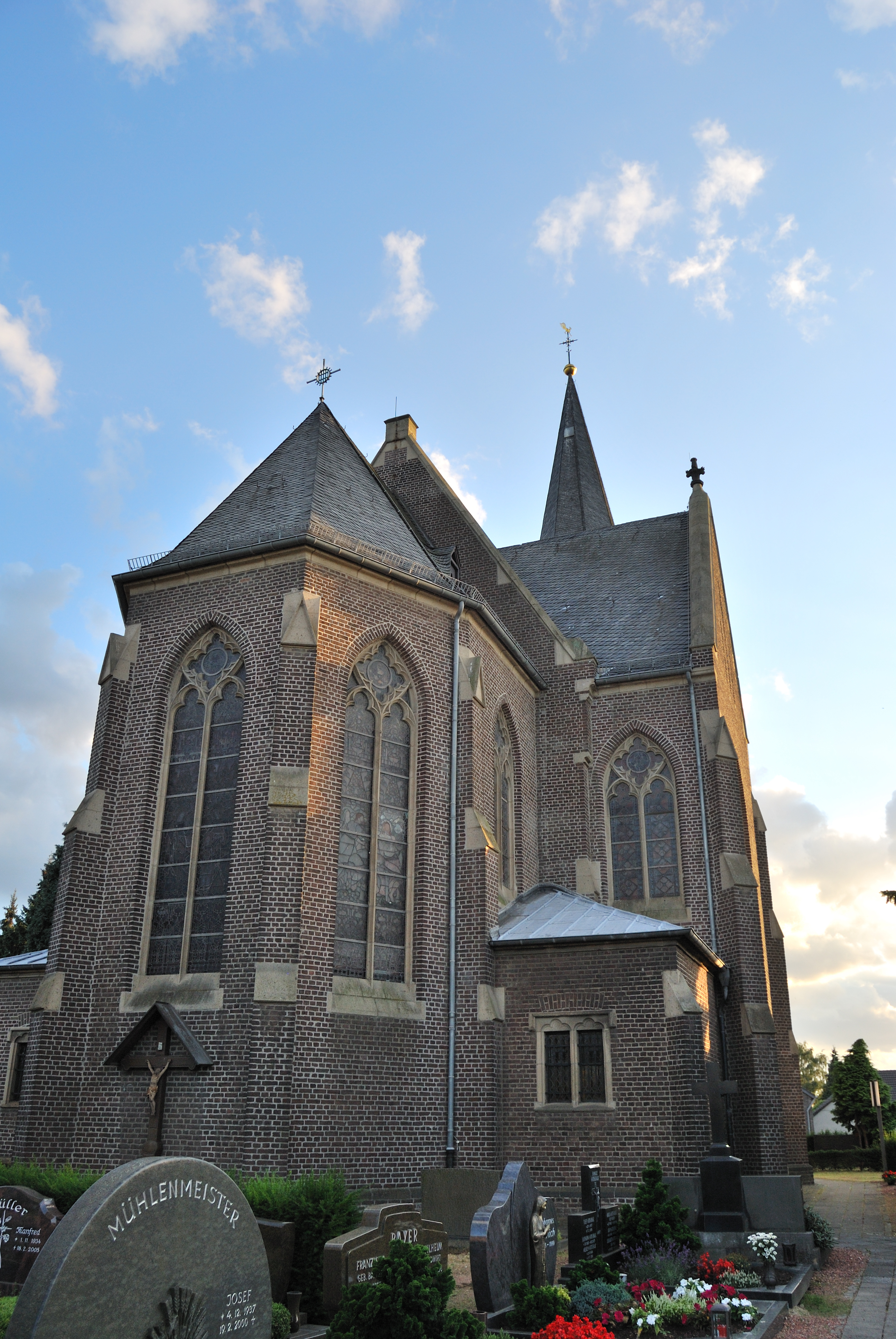 Denkmalnummer 12; Windmühlenstraße 19